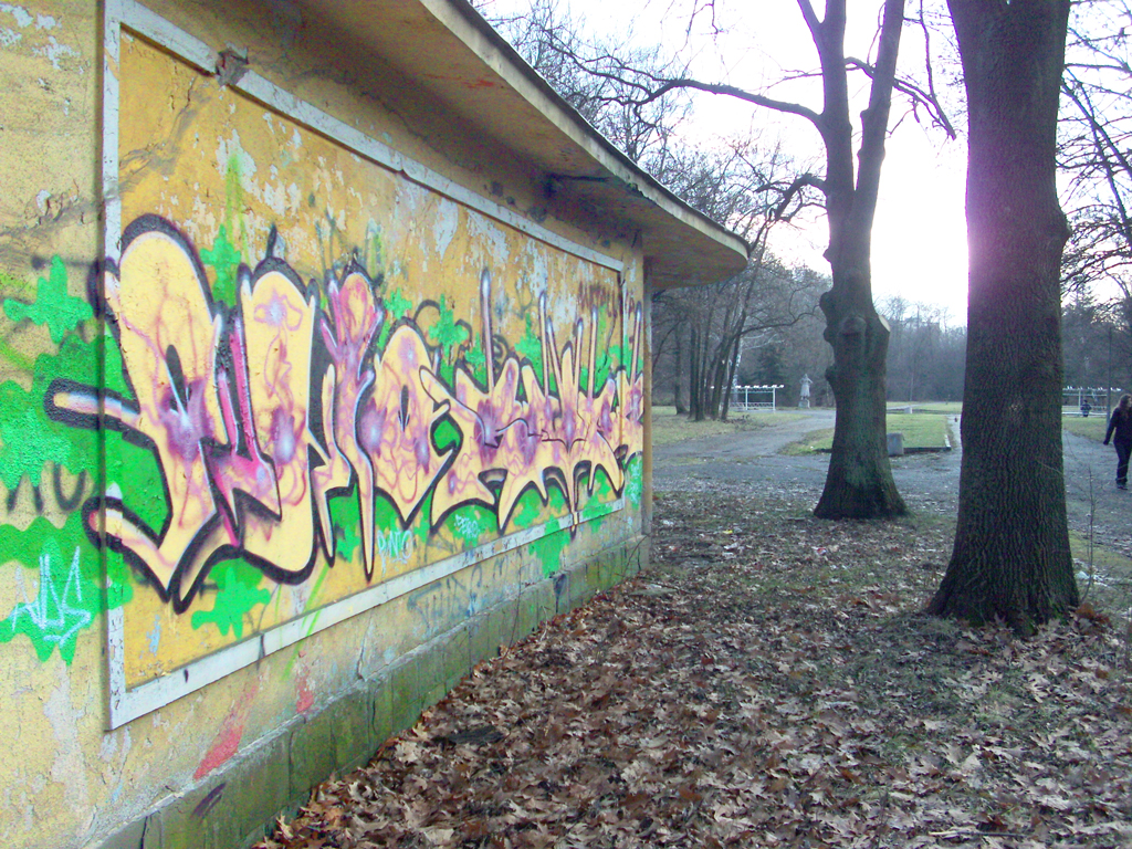 Кривите огледала, Западен парк, София